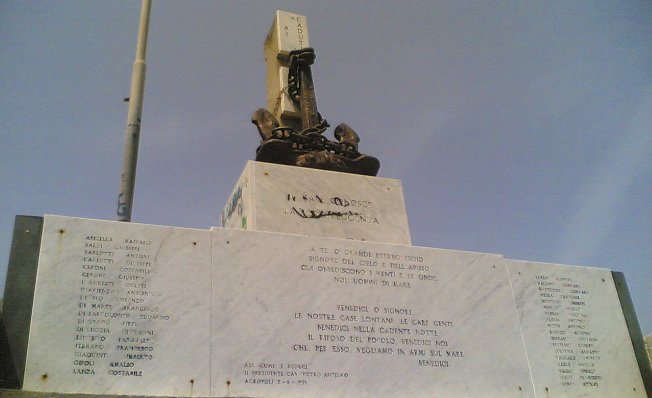 Carlo Iannuzzi, Opera Propria, Agropoli - Monumento dei Caduti in Mare, GFDL e Creative Commons CC-BY-SA tutte le versioni (3.0, 2.5, 2.0 e 1.0), sono l'autore